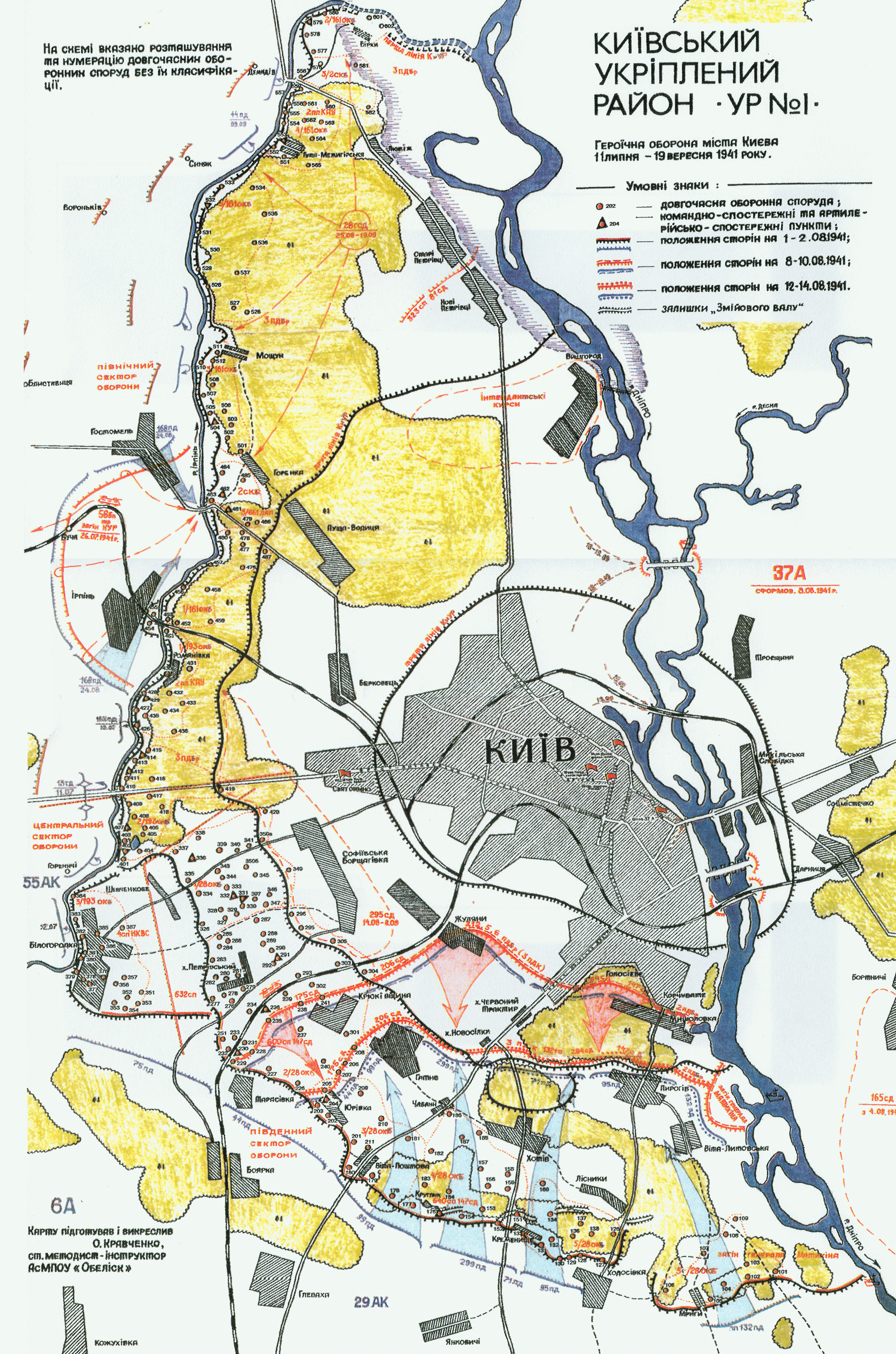 Киевский укрепрайон, УР-1. Карта составленная А. Кравченко